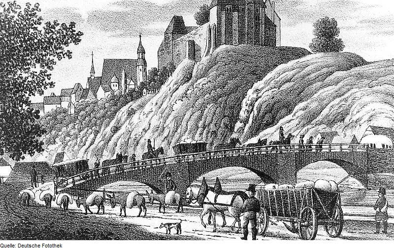 Original image description from the Deutsche Fotothek Leisnig. Mehltransport